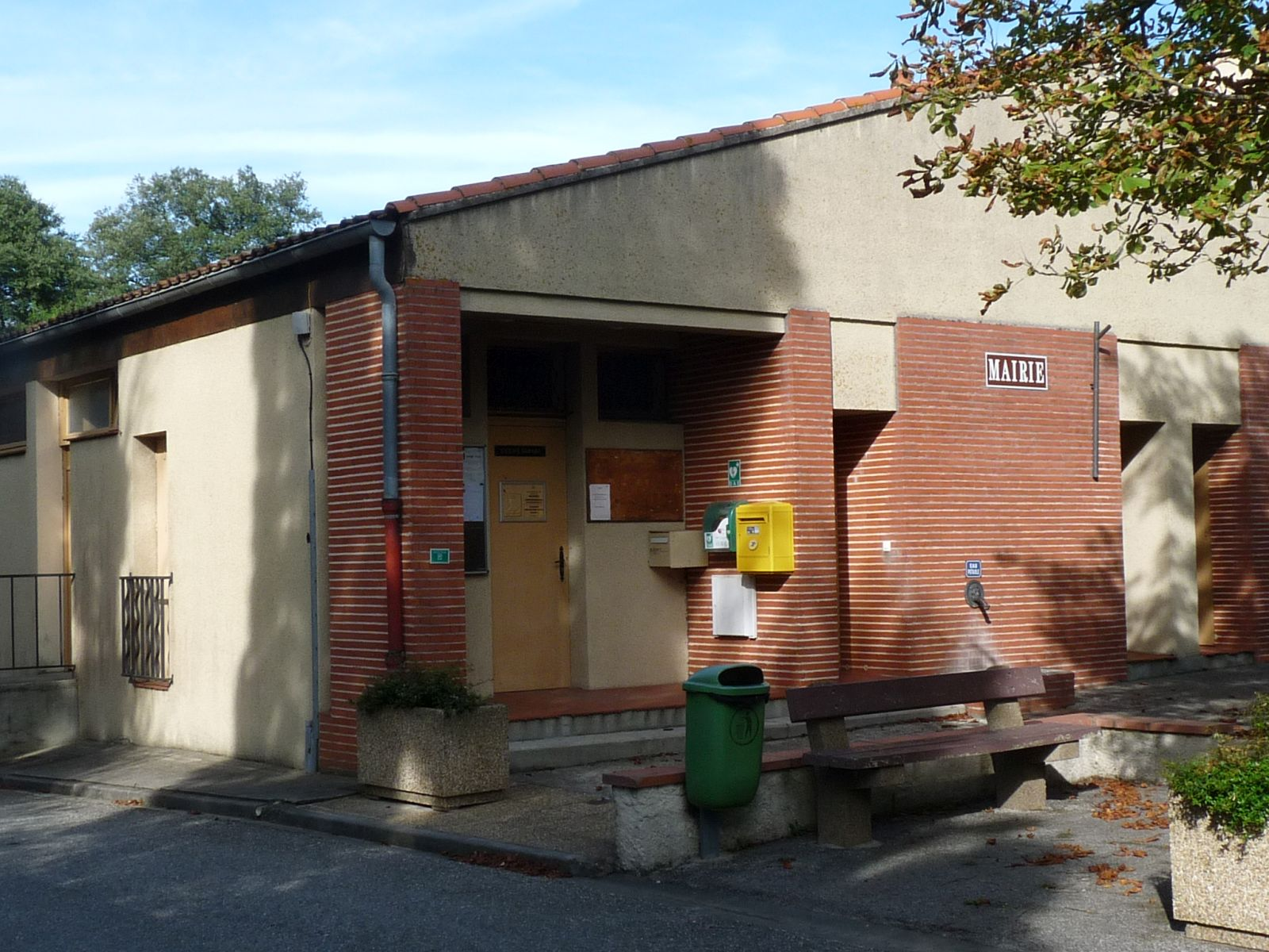 Mairie de Renneville, Haute-Garonne, France